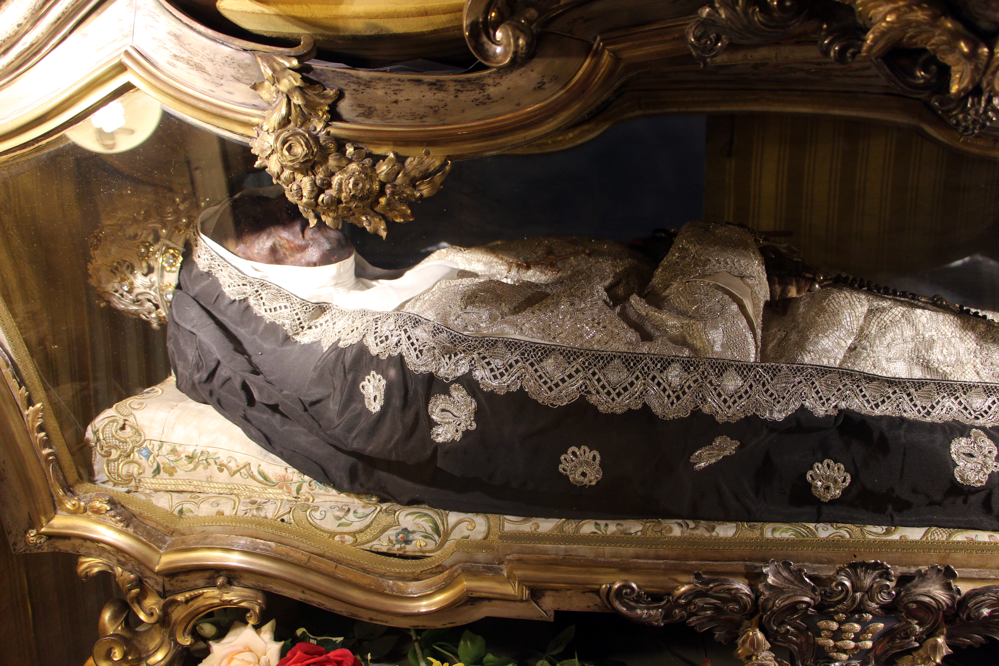 Santi Vincenzo e Caterina - Prato